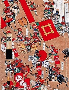 関が原の戦いにおける井伊の赤備え。『関ヶ原合戦屏風』より該当部分を切り出した。